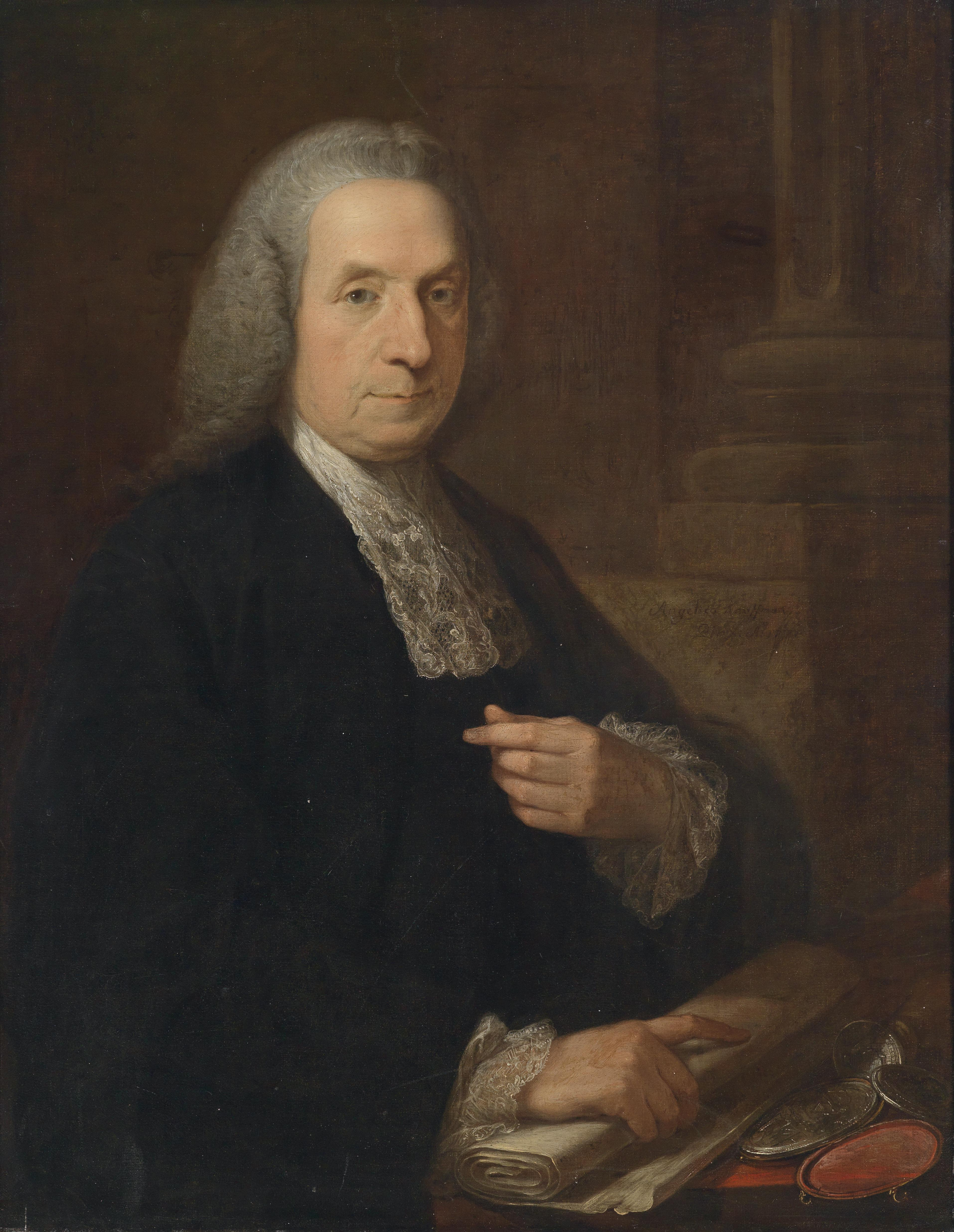 Bildnis des irischen Juristen und Politikers Philip Tisdall SL (1703–1777)